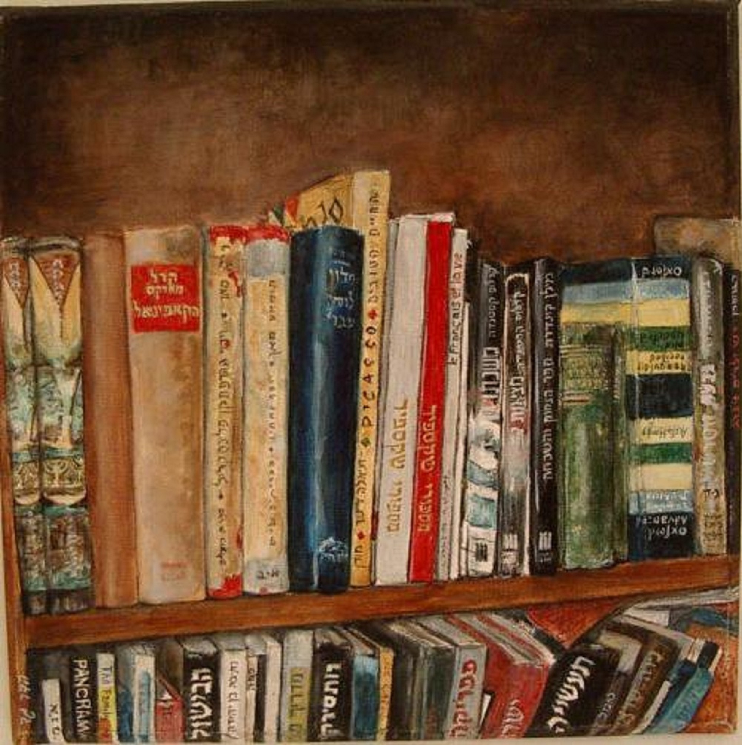 ציור מסדרת התפנימים